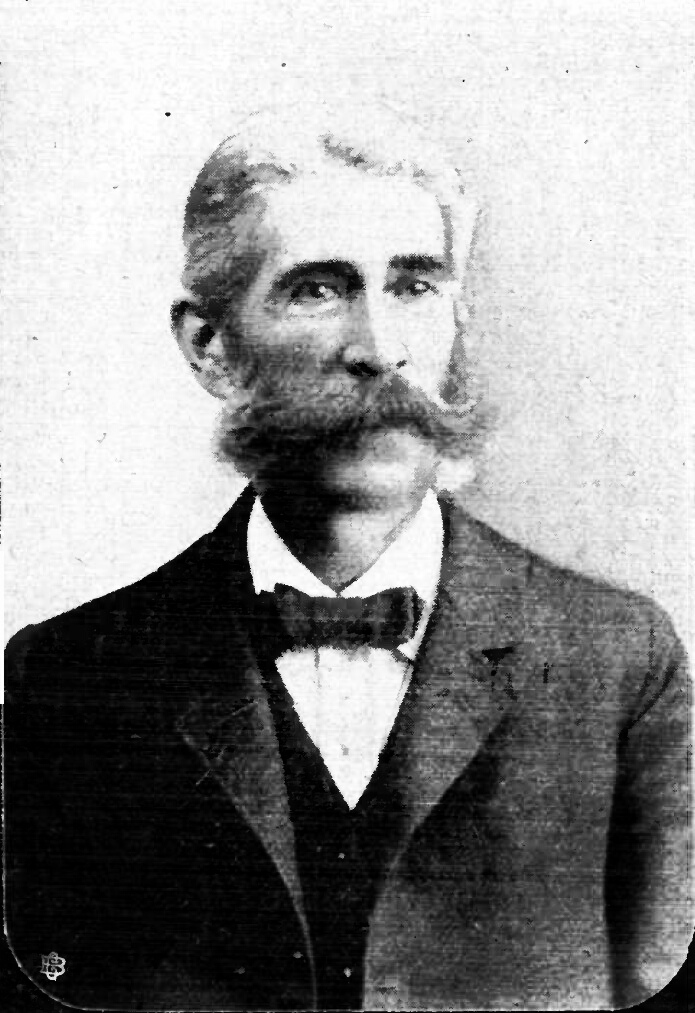 Bankdirektor E. W. Stiller, Wortführer des Bürgerausschusses.